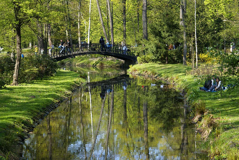 Wrocław Śródmieście - Park Szczytnicki, XVIII/XIX)